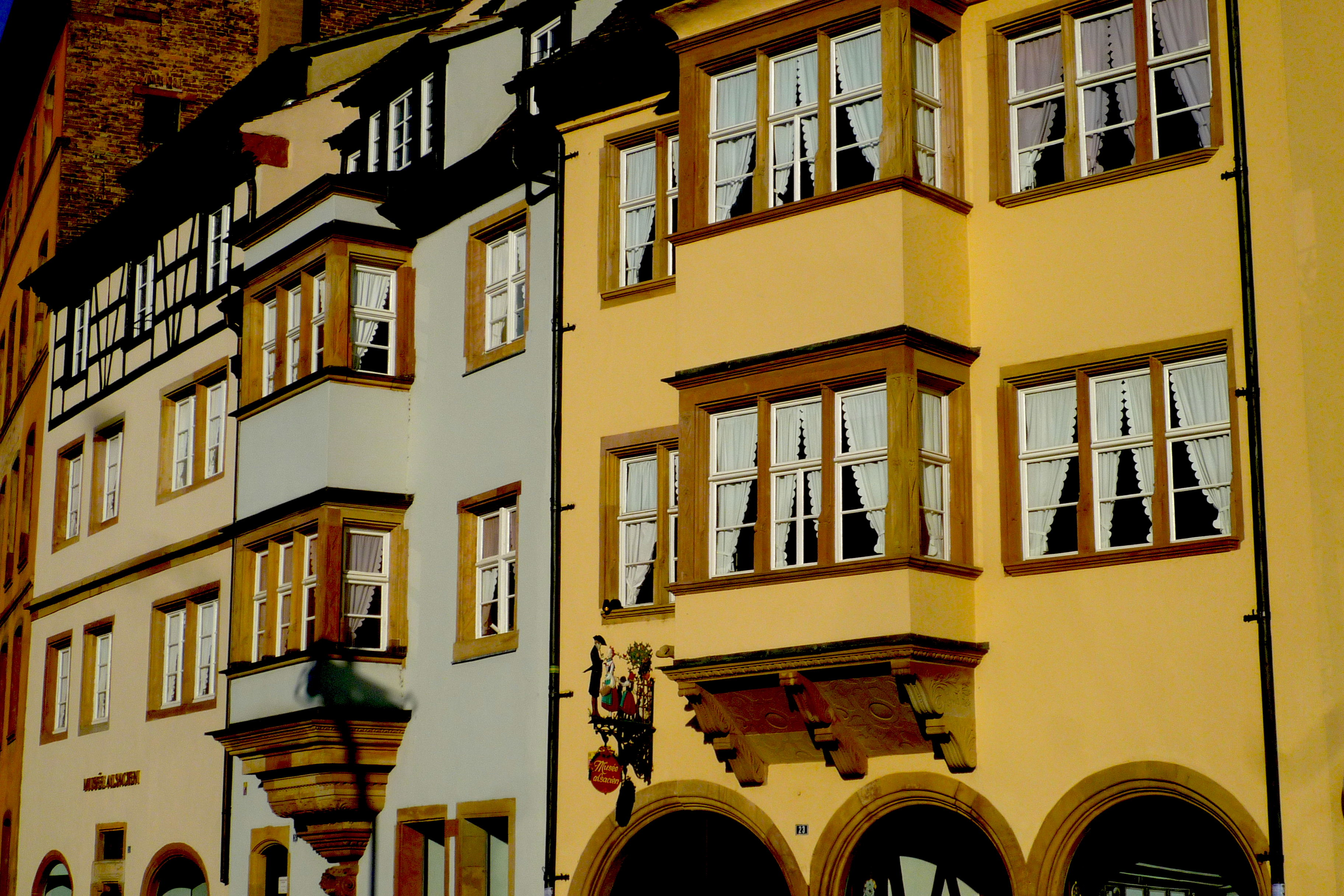 Strasbourg, façade du Musée alsacien sur le quai Saint-Nicolas